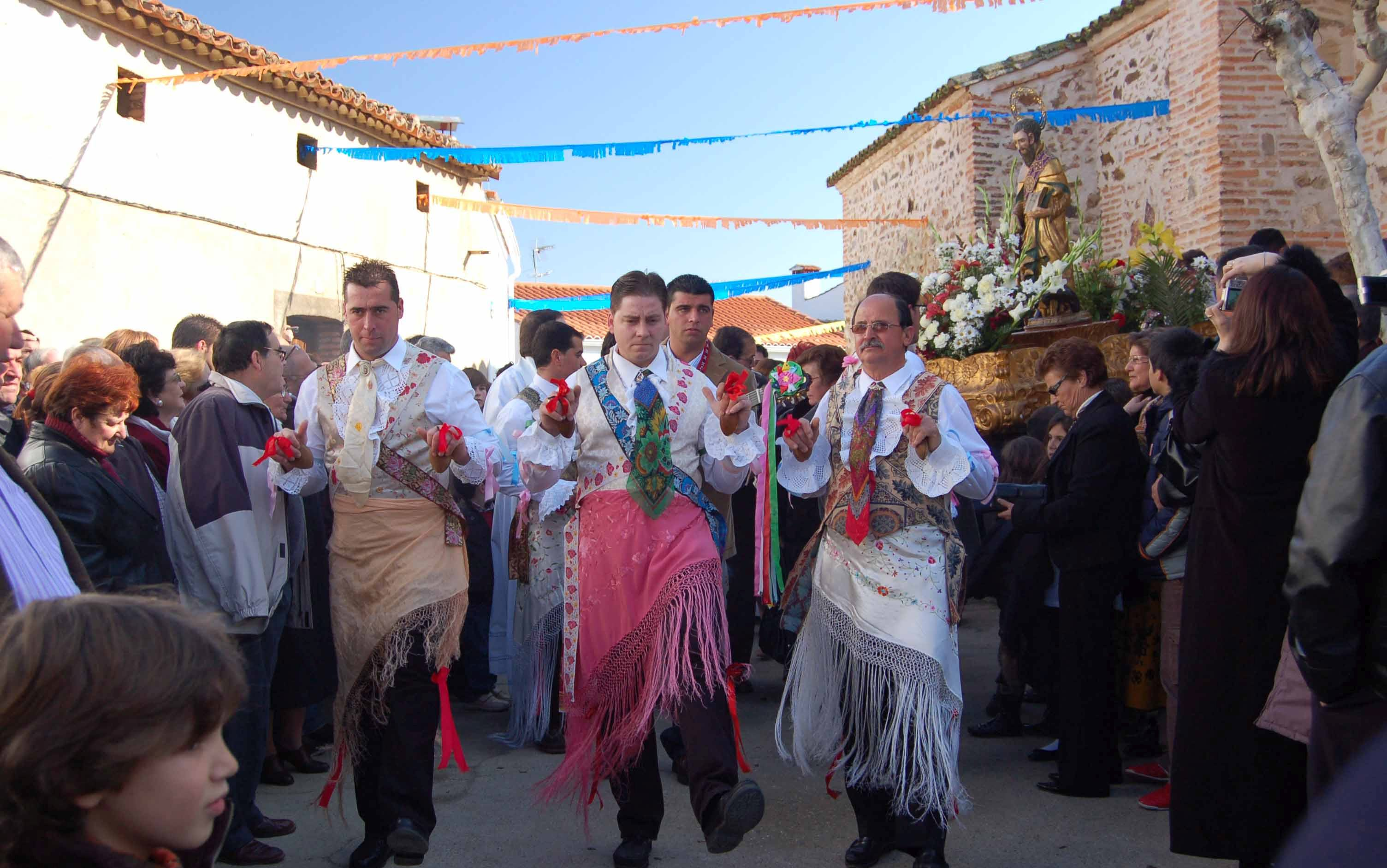 Los danzantes en la fiesta de San Antón en Peloche (Badajoz). Es fiesta patronal de Peloche pero también es festivo en Herrera del Duque al ser Peloche una pedanía dependiente de Herrera. Se celebra el 16 y 17 de enero, durante estas fiestas tiene lugar la tradicional danza de San Antón.